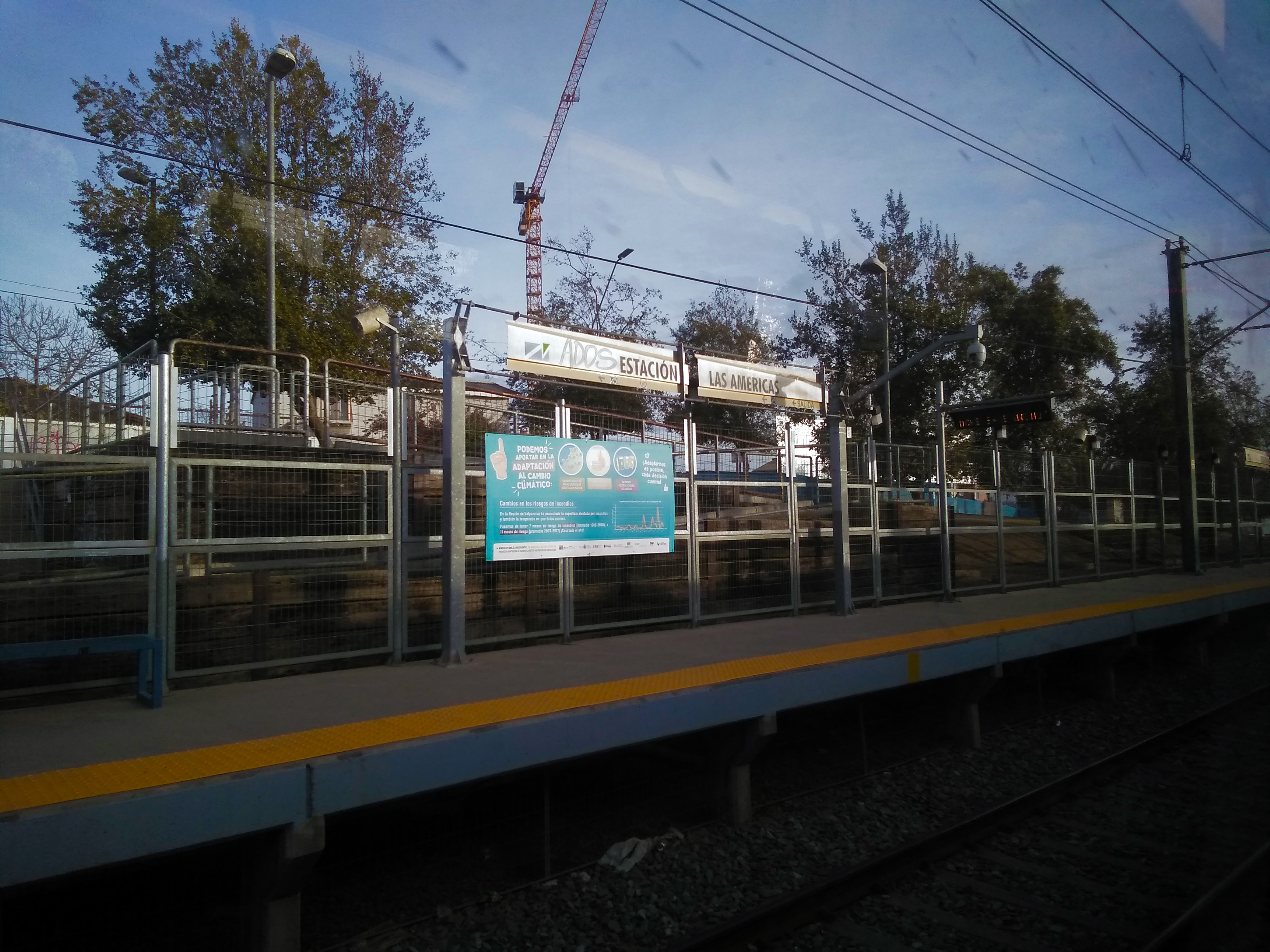 Andén en dirección Limache de la estación Las Américas del Metro Valparaíso.